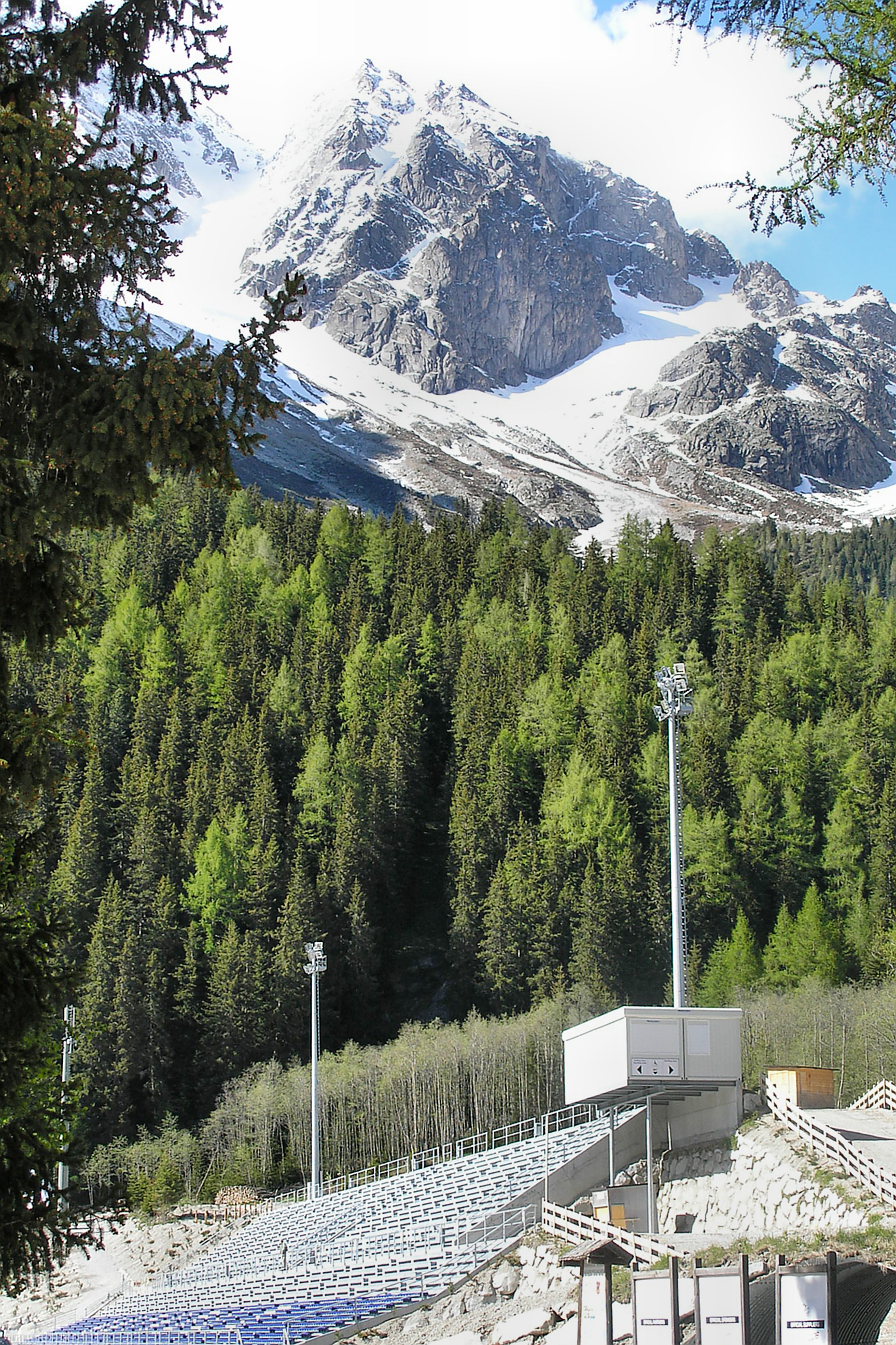 Skistadion unterhalb des Antholzer Sees